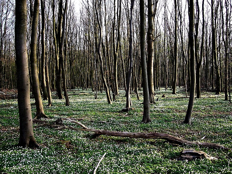 Anemonenteppich im Vorwedener Wald bei Rostock